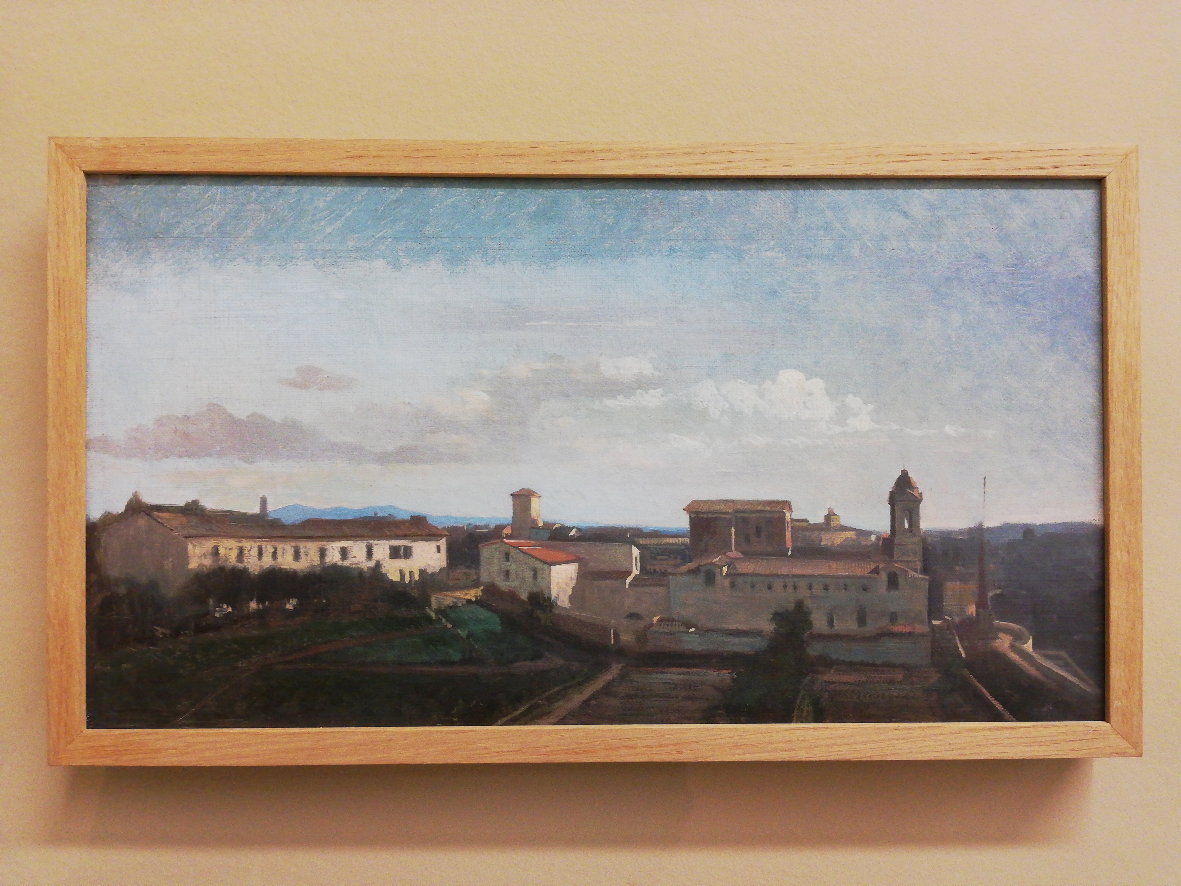 Rome, la Trinité des Monts - Ernest Hébert. Non daté, non signé. Dépôt du Musée Hébert de Paris. Musée Ernest Hébert (La Tronche, France).